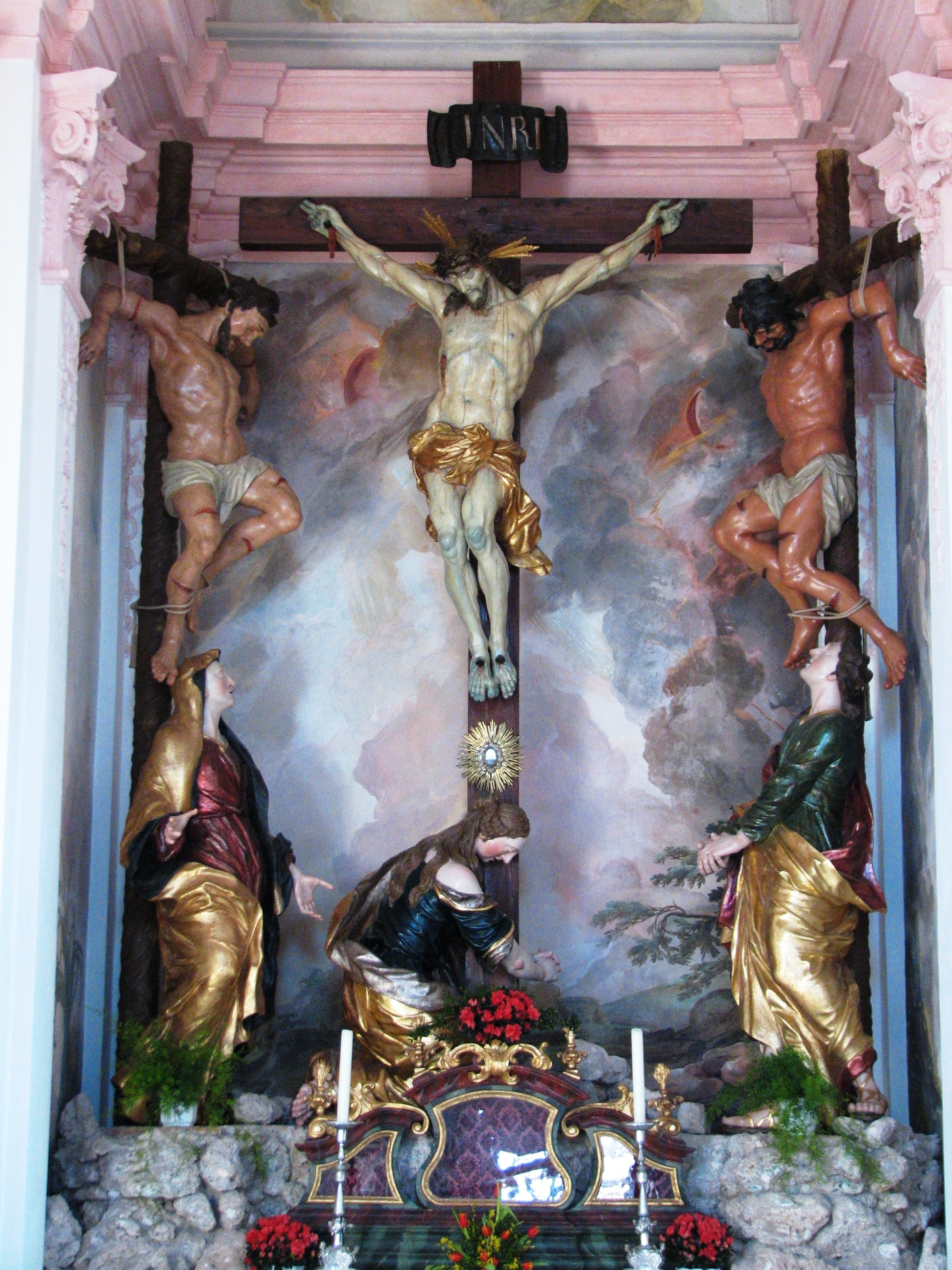 Kreuzigungsgruppe vom Kremsmünsterer Bildhauer Anton Remele. (Darstellung der Golgota-Szene)